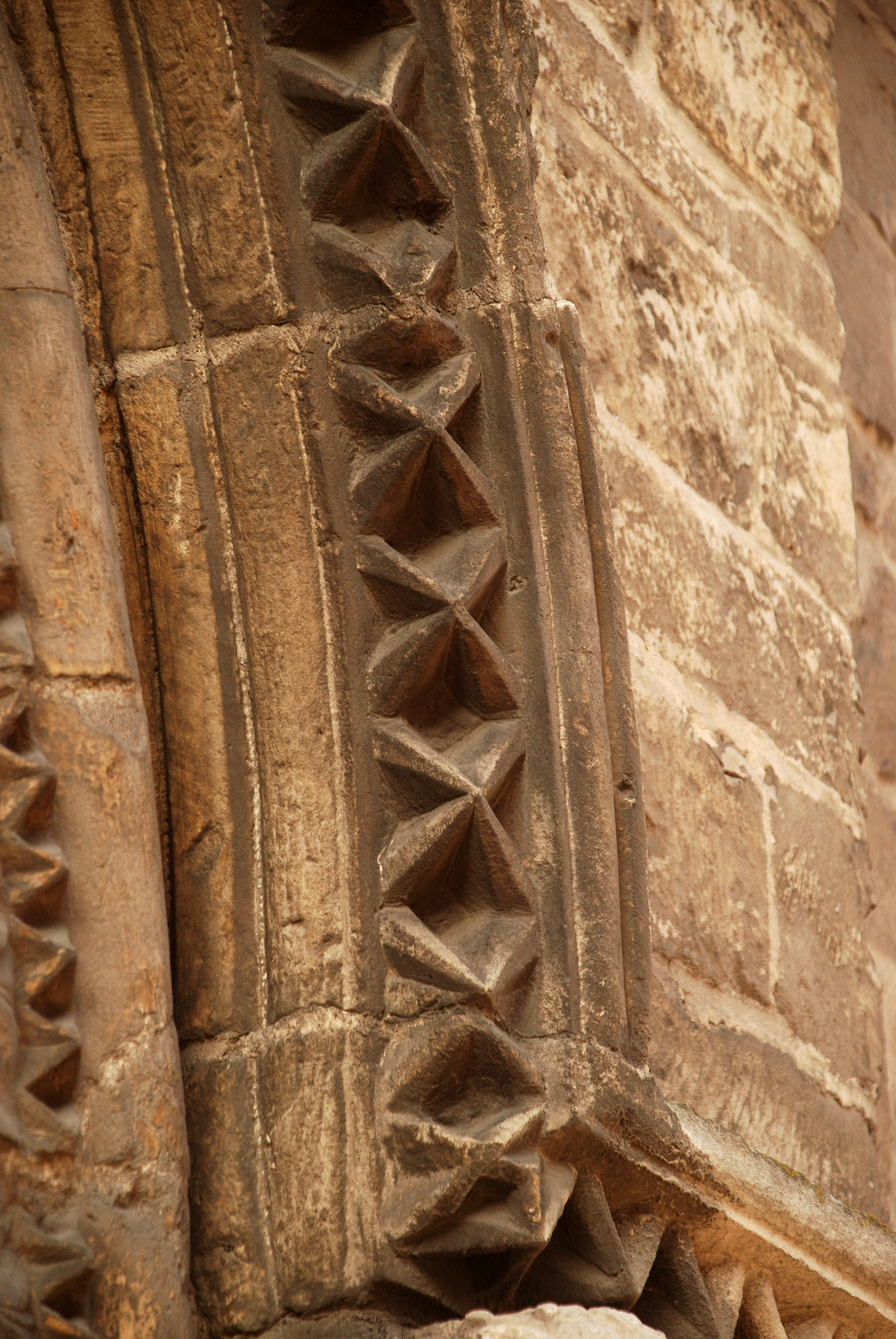 Belgique - Louvain - Chapelle de la Porte Romane